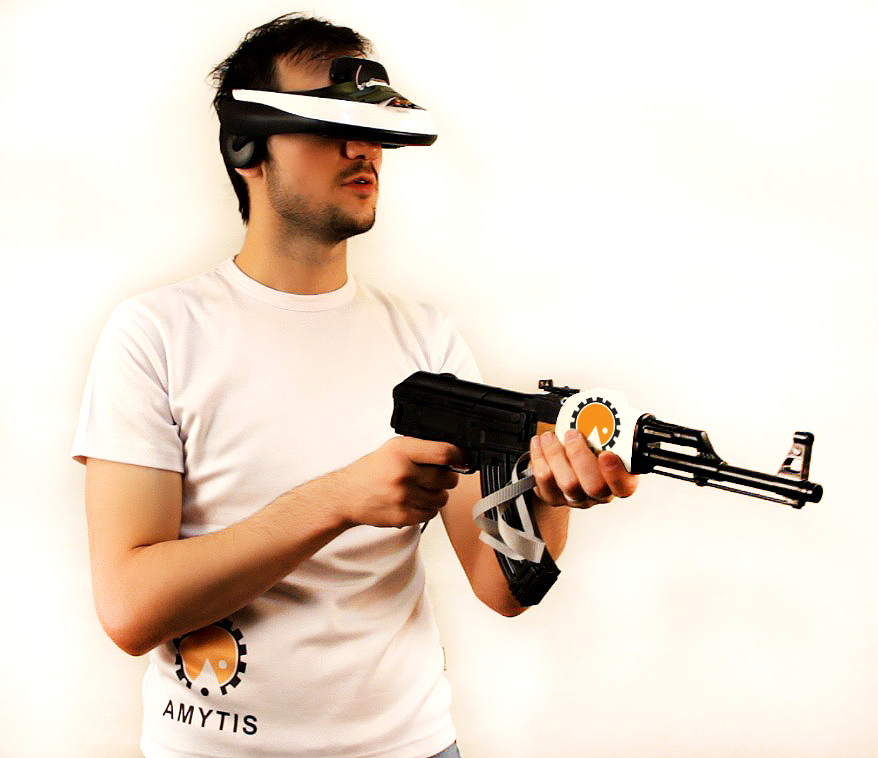 تصویری از هدست واقعیت مجازی استودیو آمیتیس